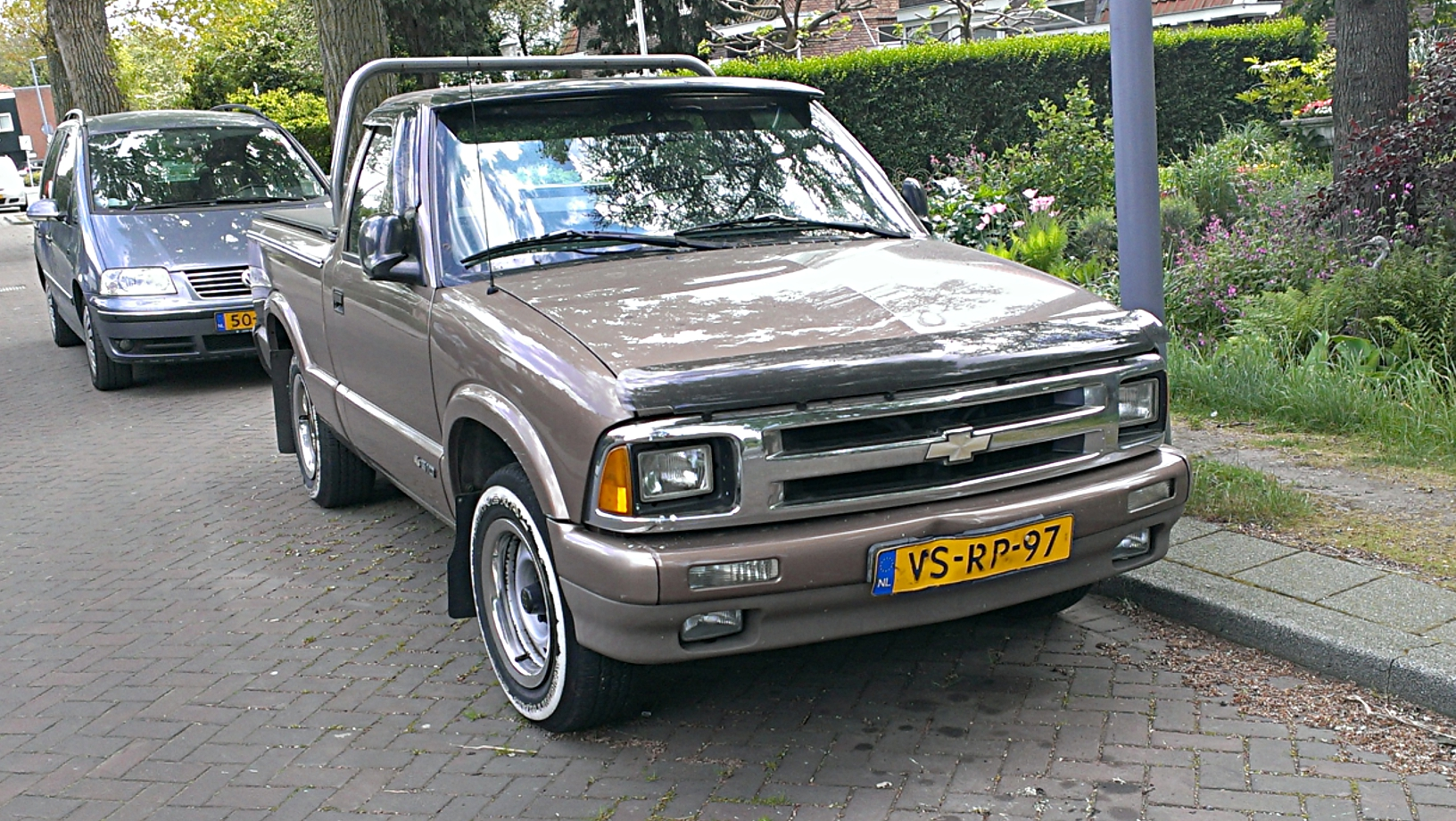 1997 Chevrolet S-10 Pickup